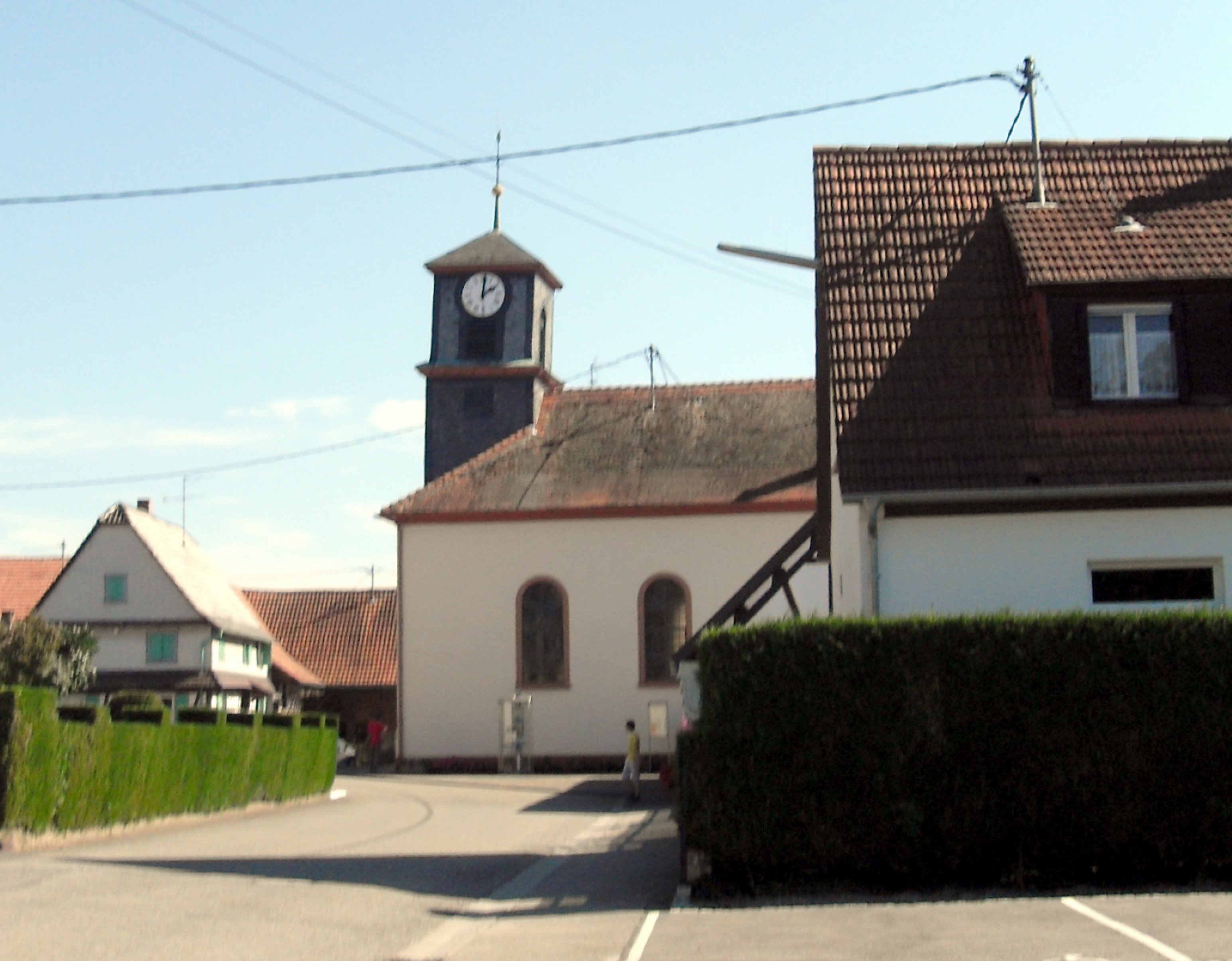 L'église Saint-Étienne, neemple protestant, à Forstfeld